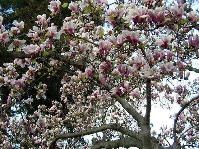 Opatija